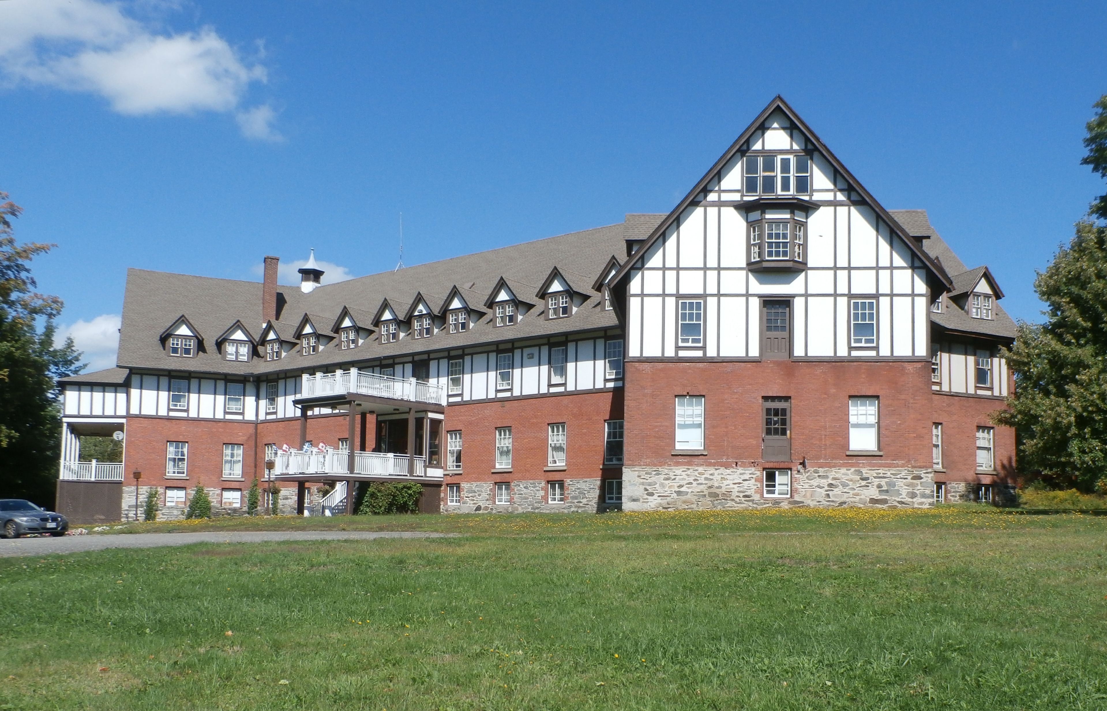 King's Hall (Compton, Québec). Collège pour jeunes filles anglo-protestantes fondé en 1874.